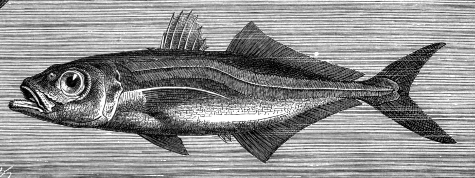 Trachurus trachurus